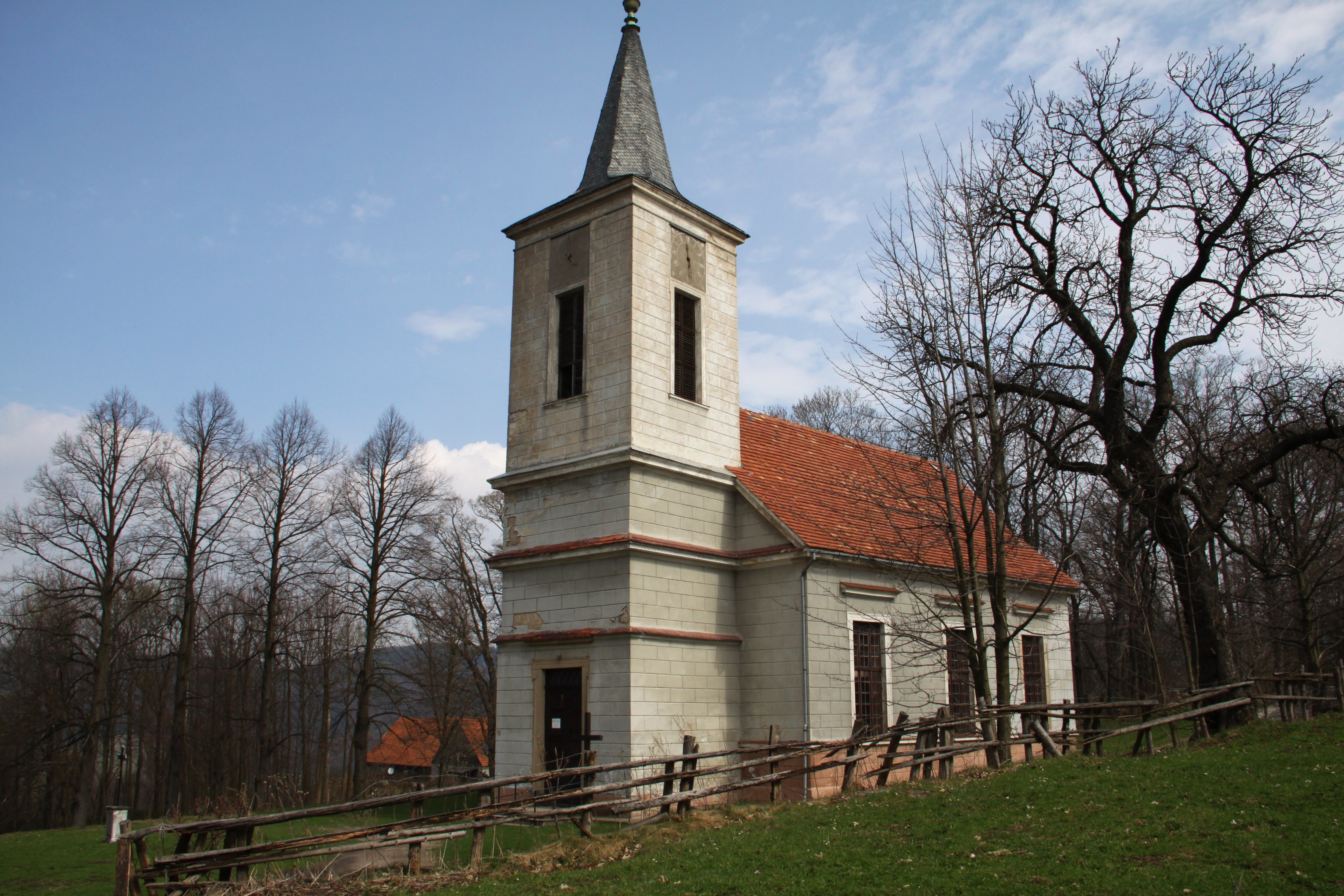 Miedzianka, kościół ewang., ob. fil. p.w. św. Jana Chrzciciela, XIX